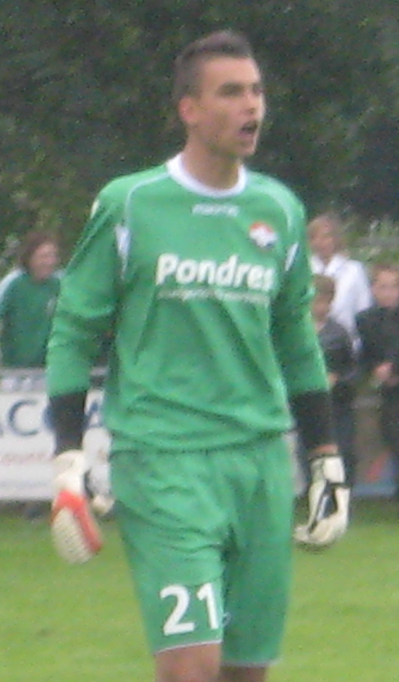 debuut oefenwedstrijd 1ste team willem 2